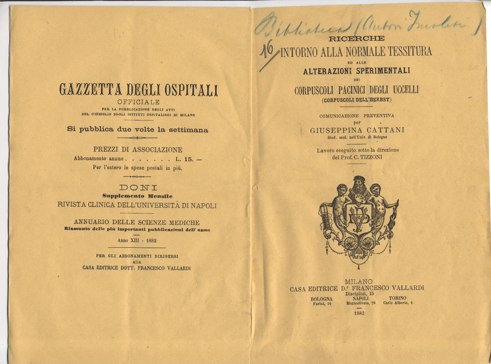 Frontespizio